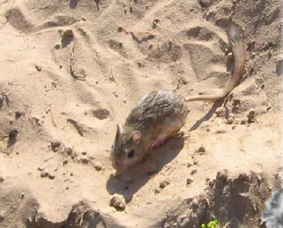 Ємуранчик звичайний (Stylodipus telum)